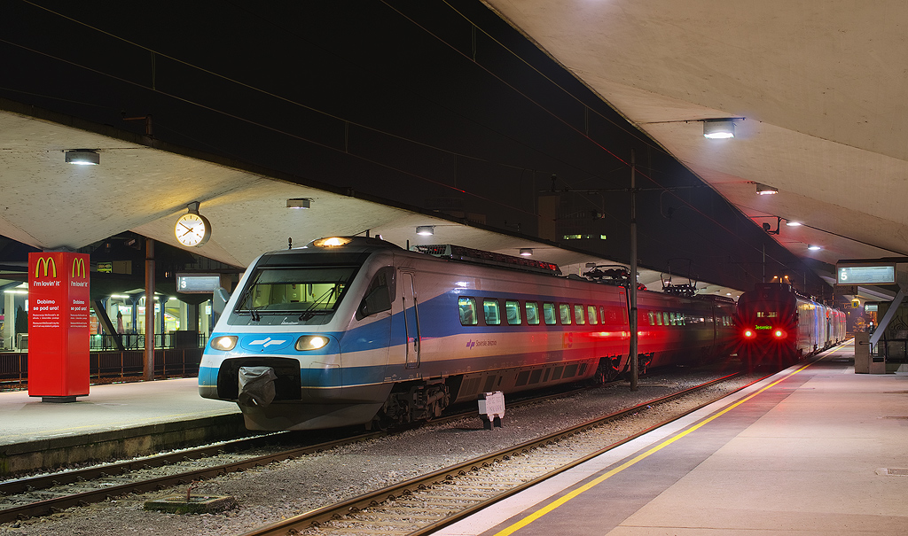 29.12.2012, SŽ 310, Ljubljana, Slovenia